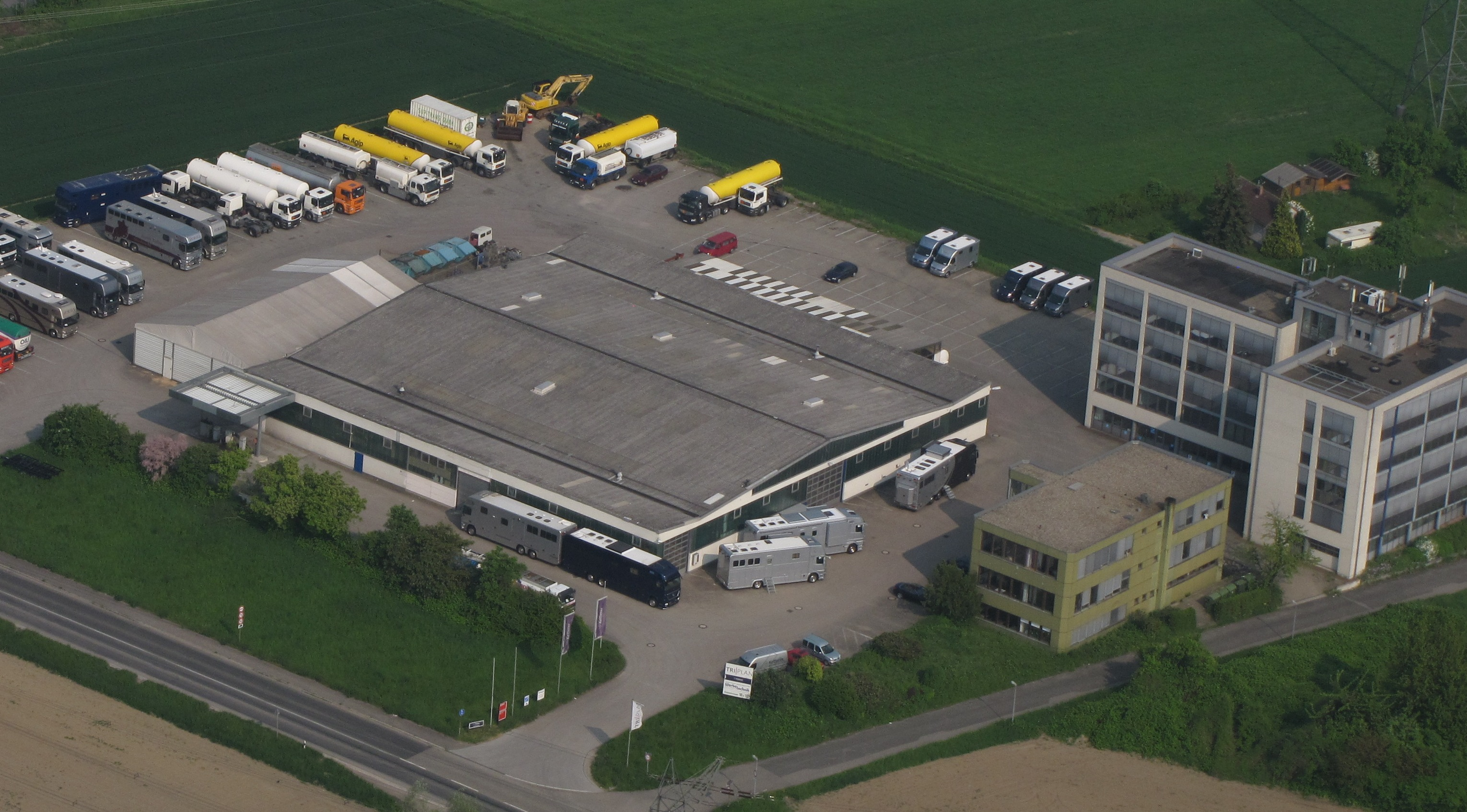 Ketterer Spezialfahrzeuge, Standort Karlsruhe